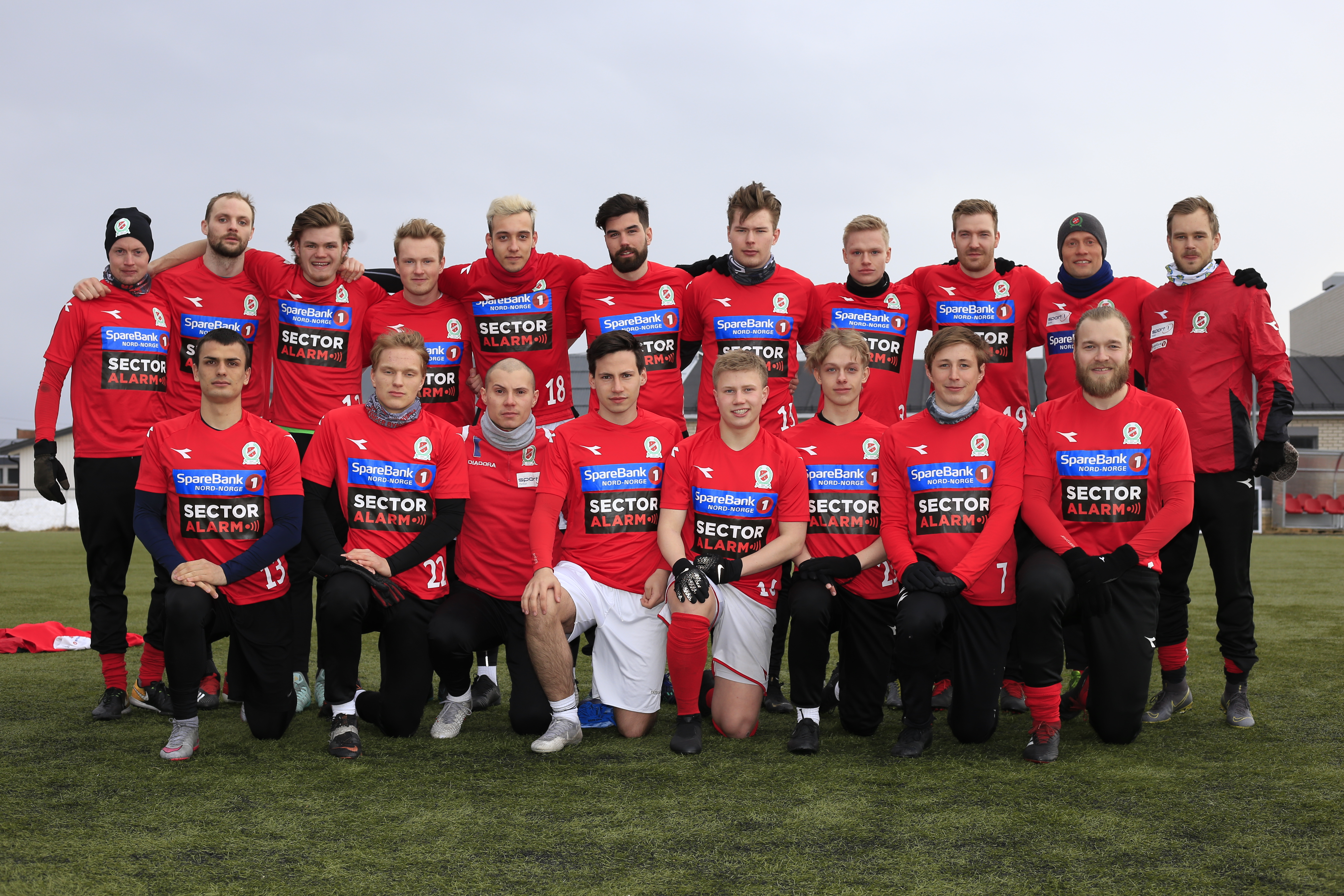 A-laget 2019